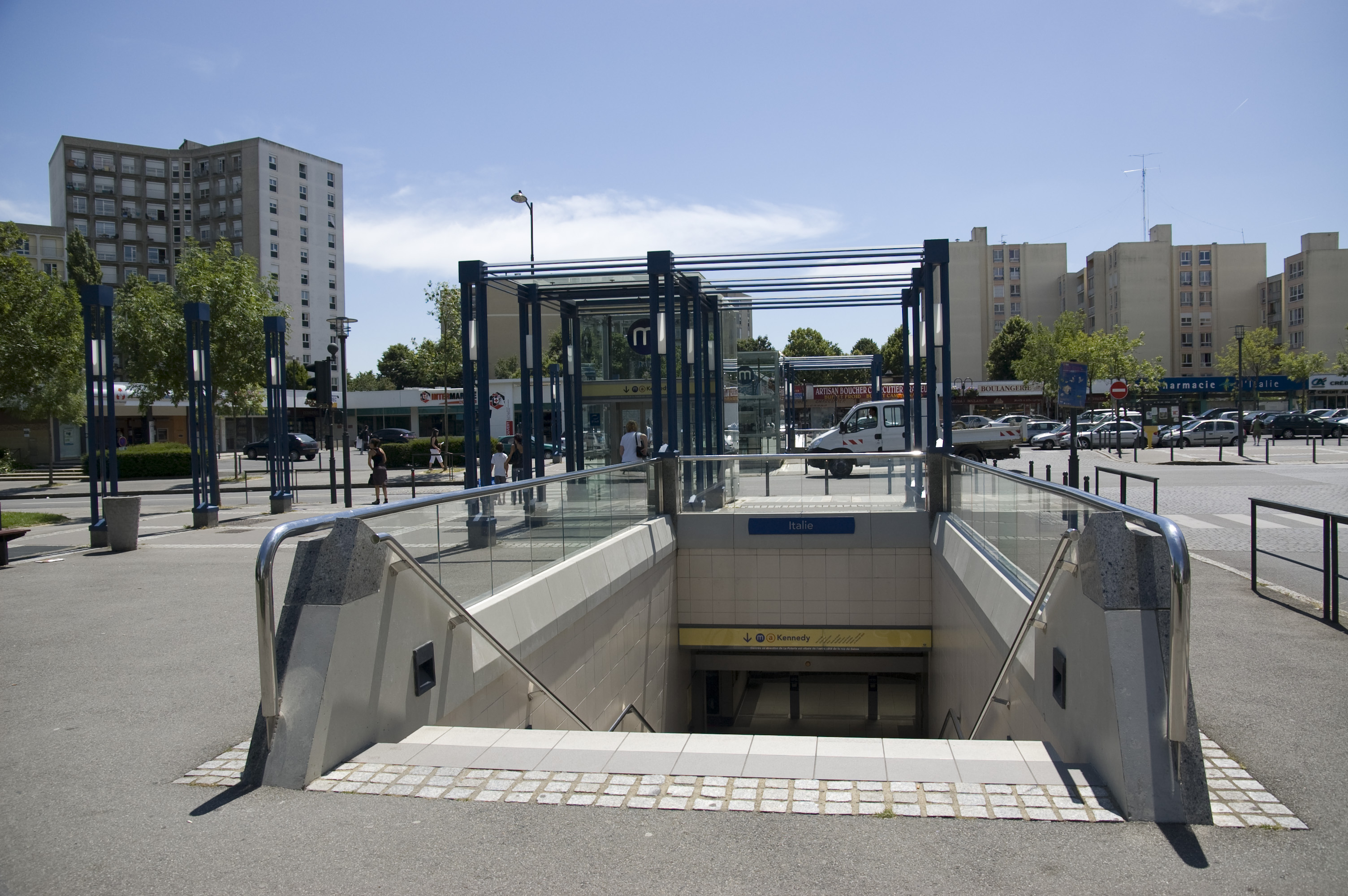 Station de métro Italie